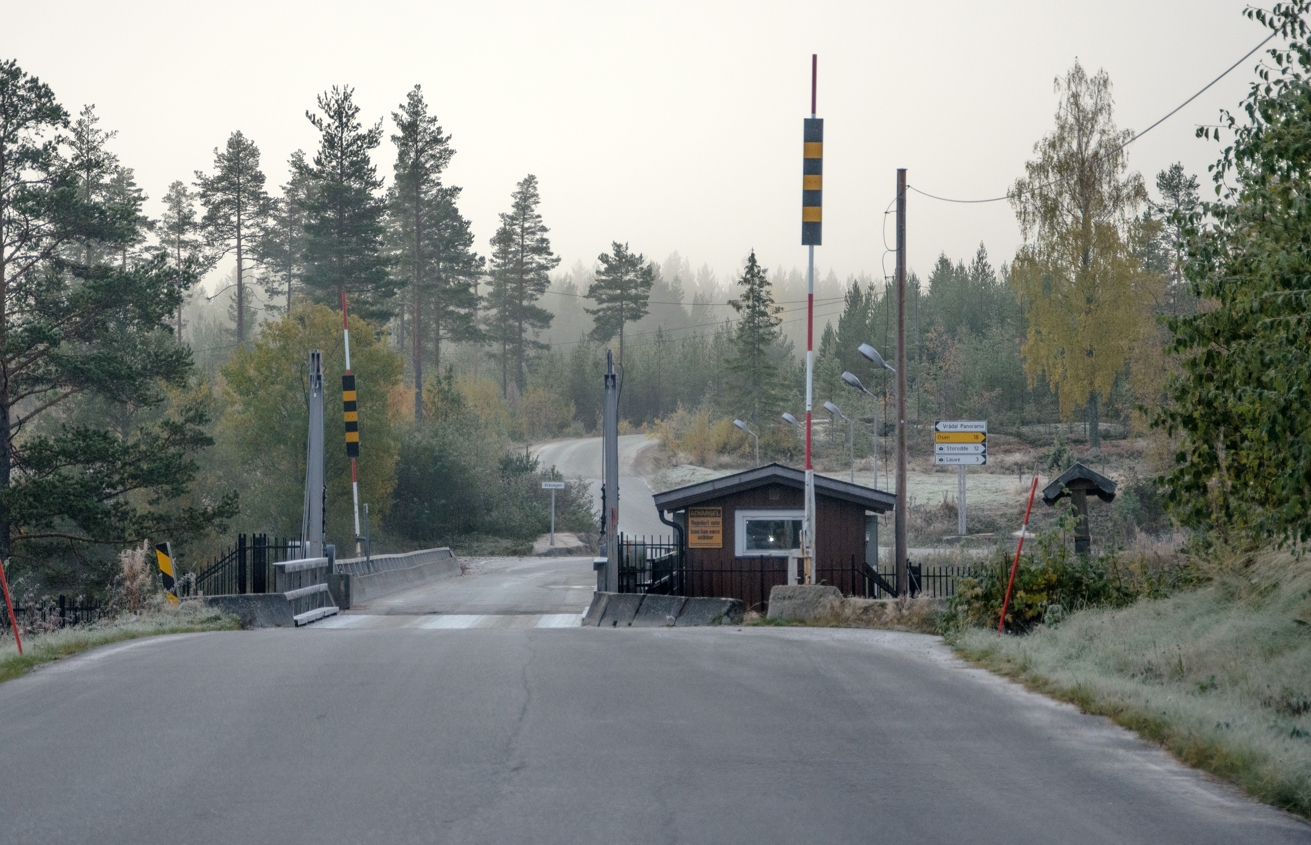 Storstraumen bru, fylkesvei 455 i Telemark